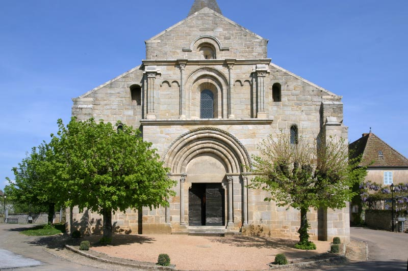 Façade ouest de l'église de Varenne-l'Arconce